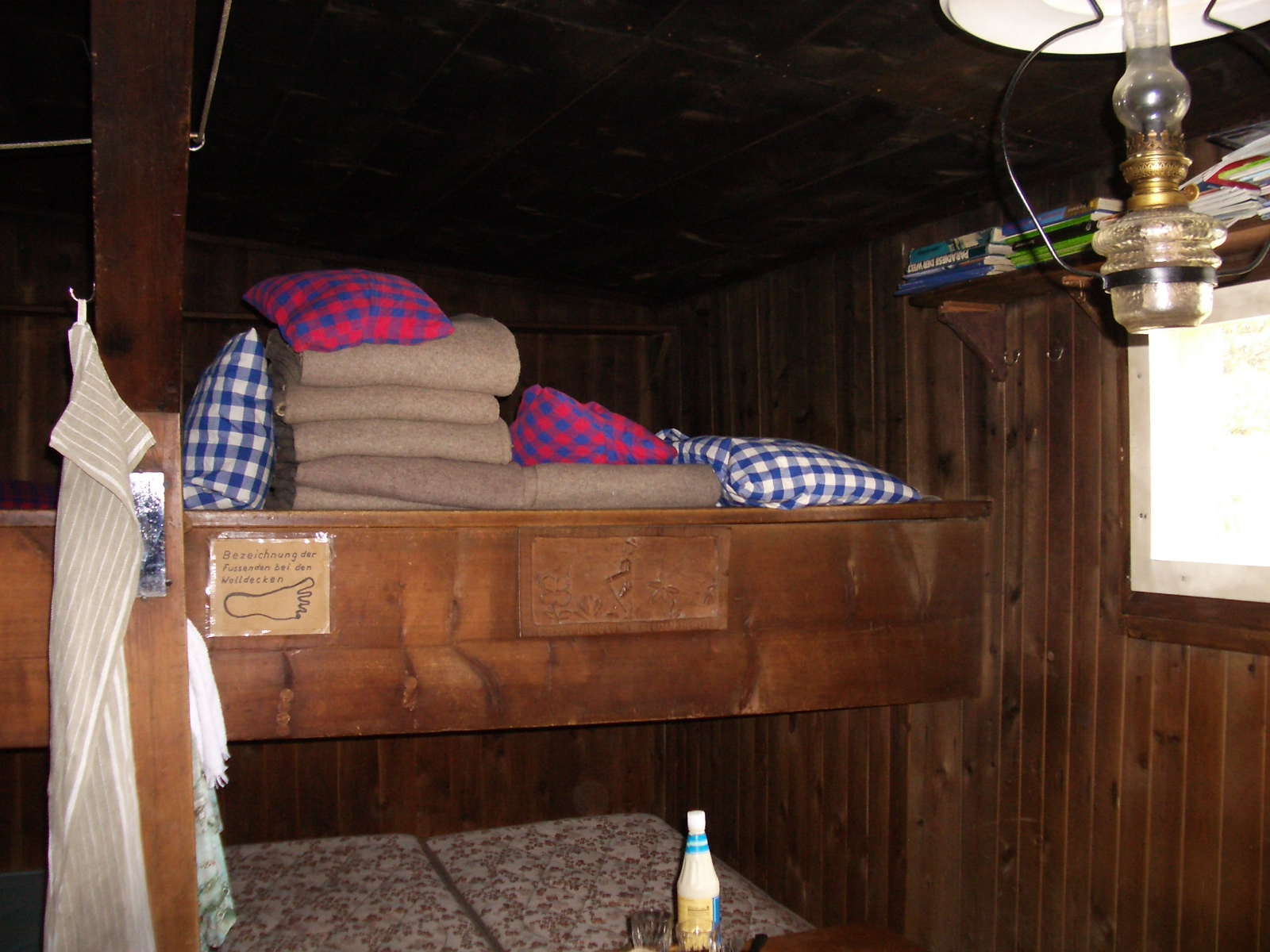 Seetalhütte, Switzerland self-made, June 2005